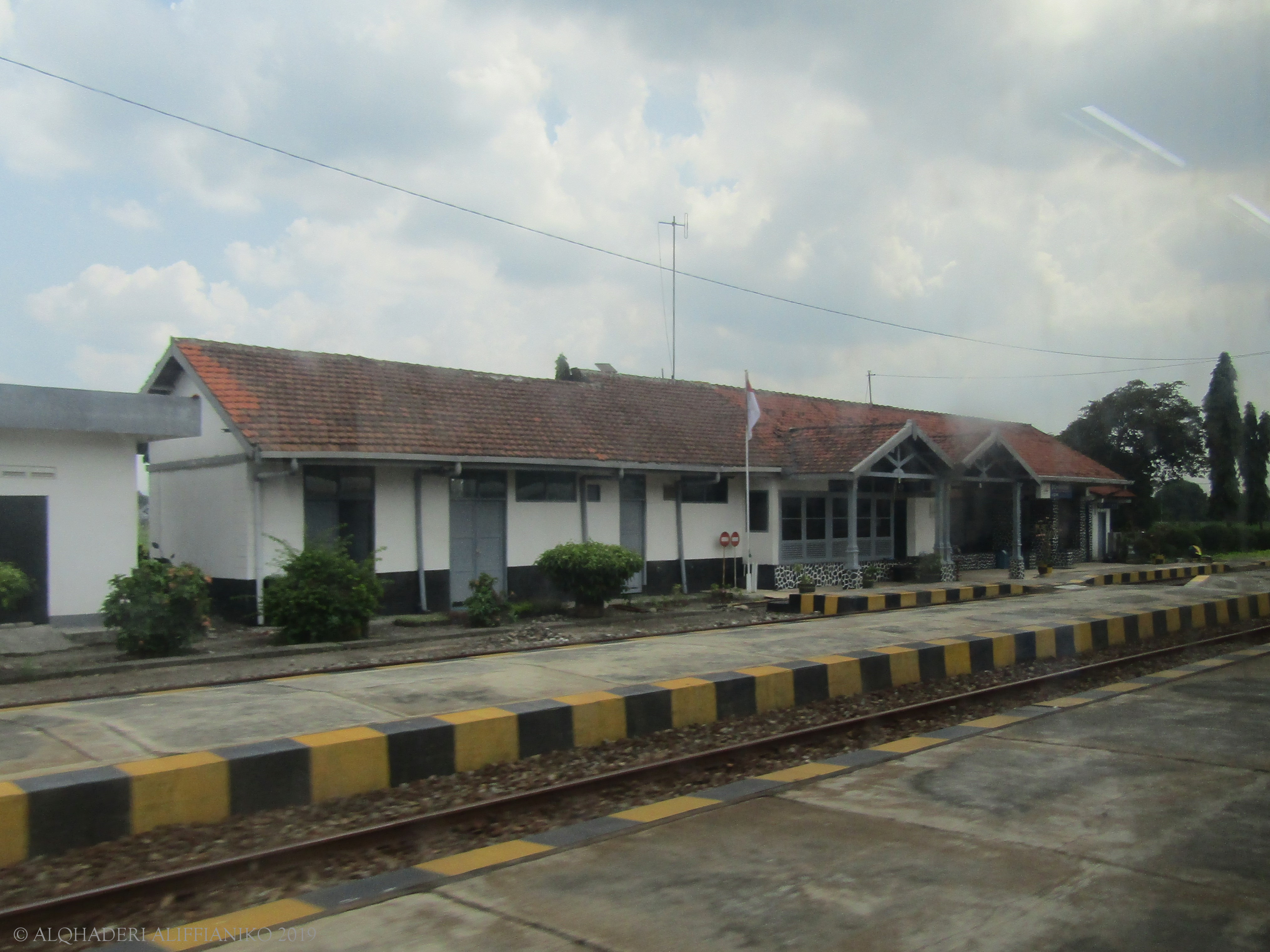 Stasiun Boharan, dilihat dari peron